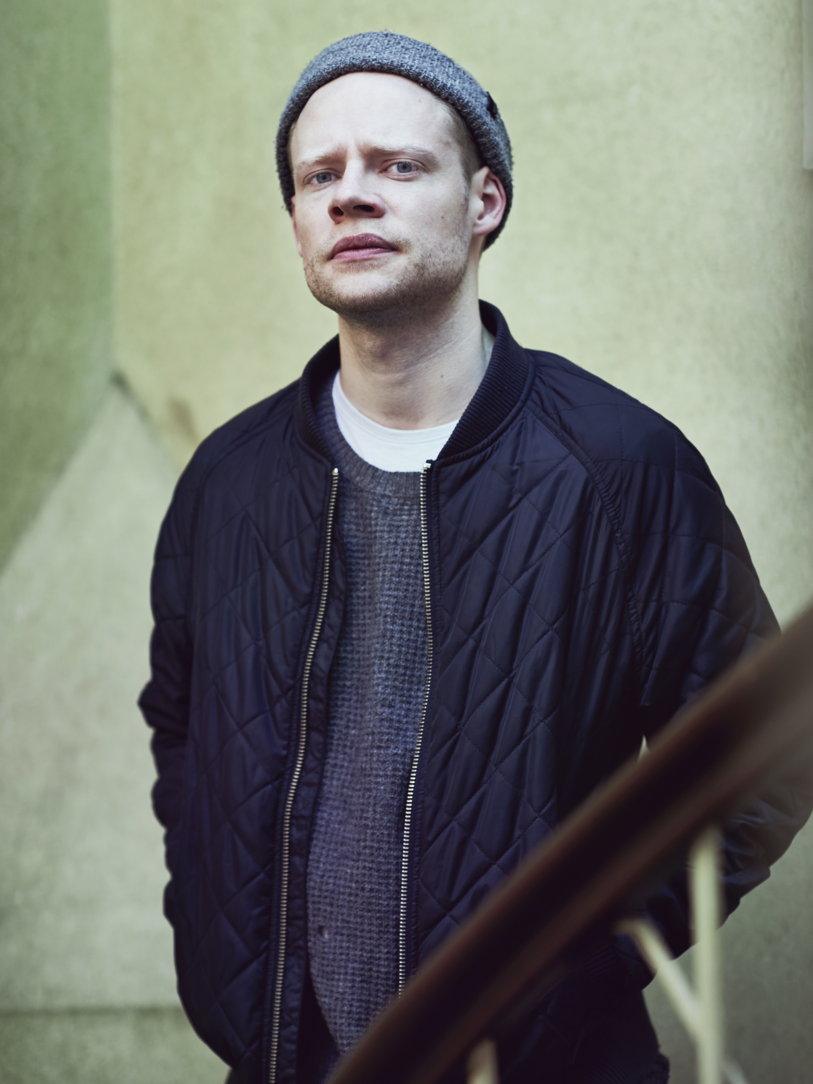 Portrait Ilja Roßbander